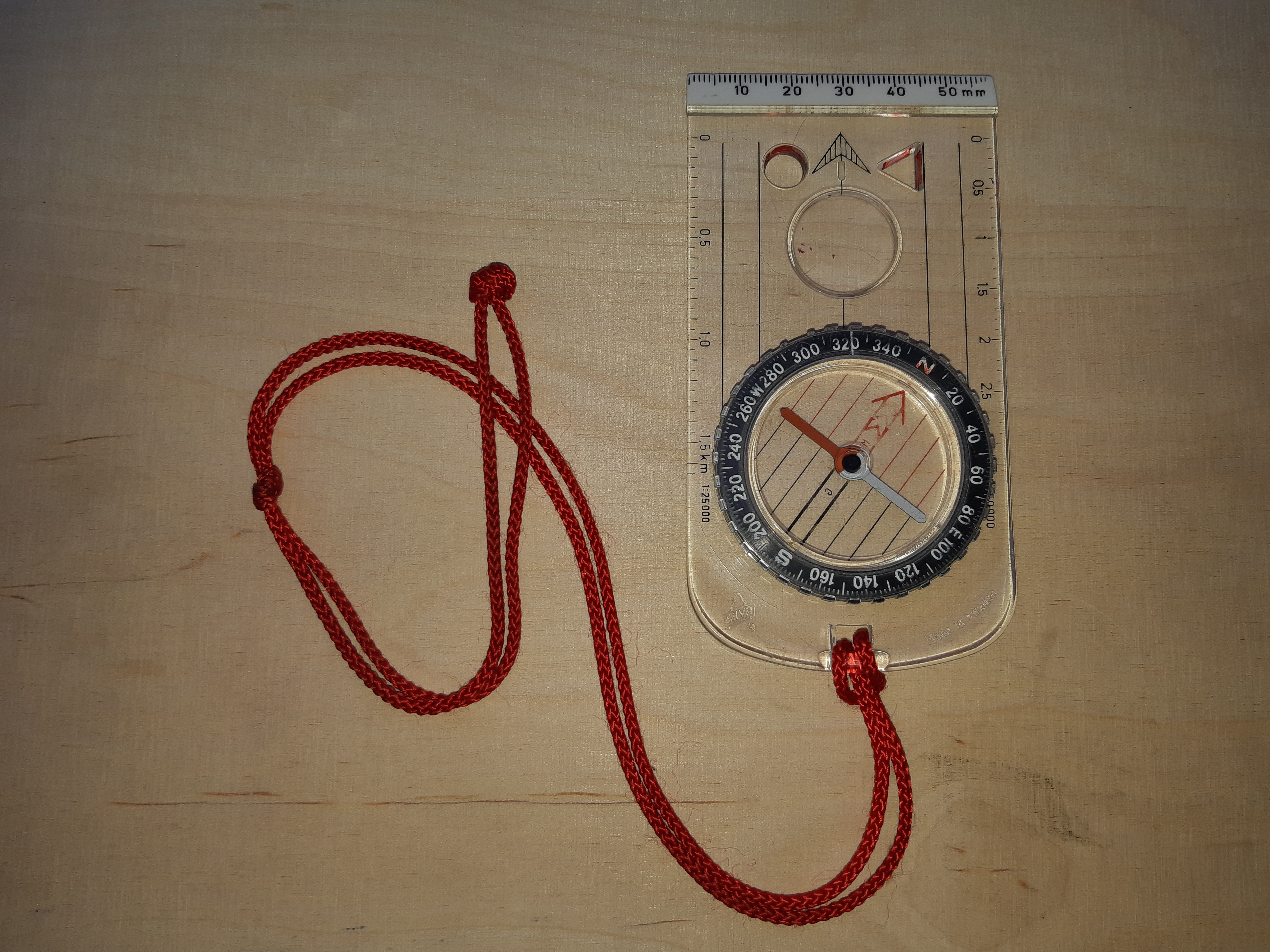 Plaadikompass